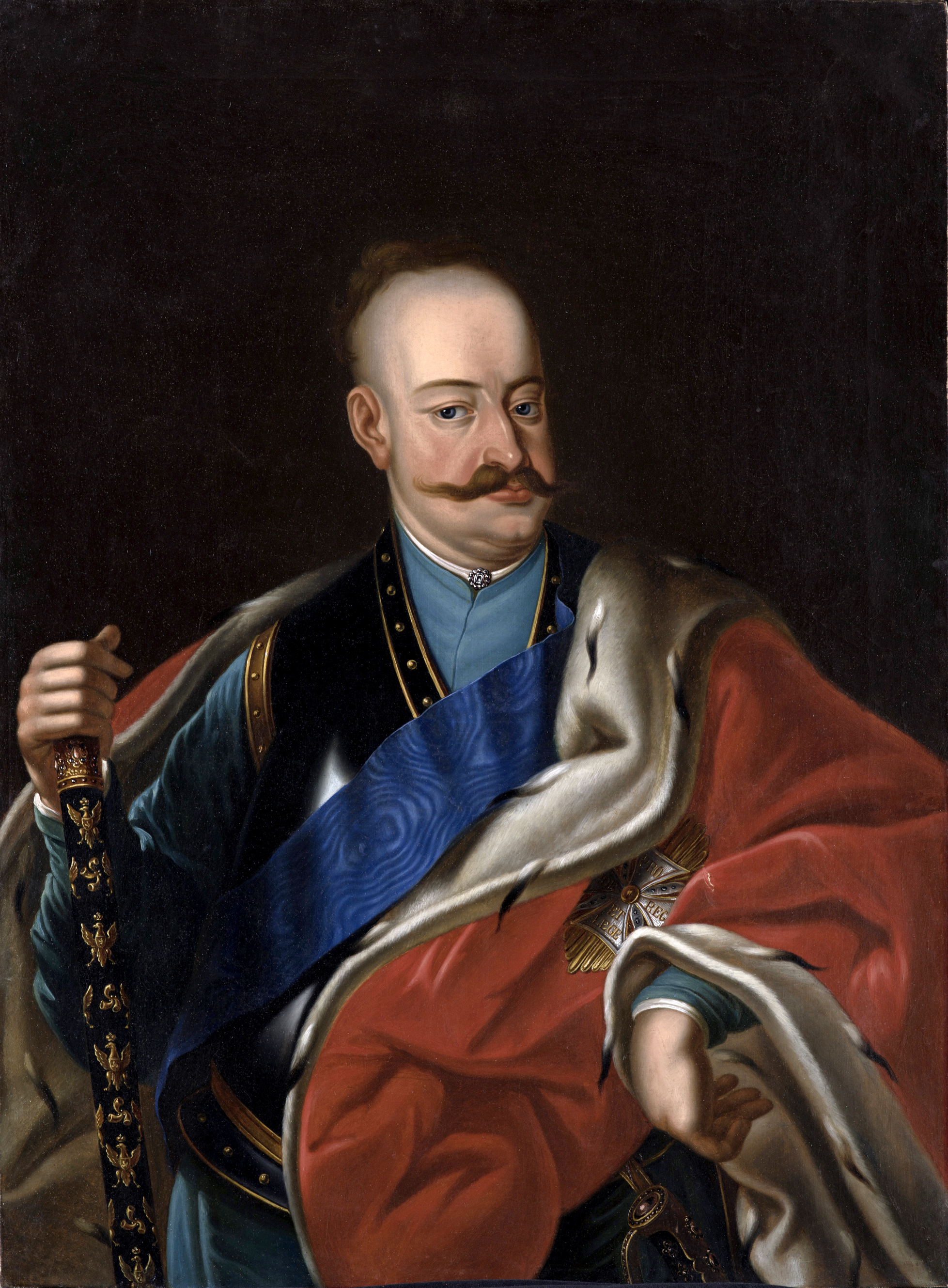 Беларуская (тарашкевіца): Партрэт Караля Станіслава Радзівіла «Пане Каханку» (Karal Stanisłaŭ Radzivił «Panie Kachanku»)